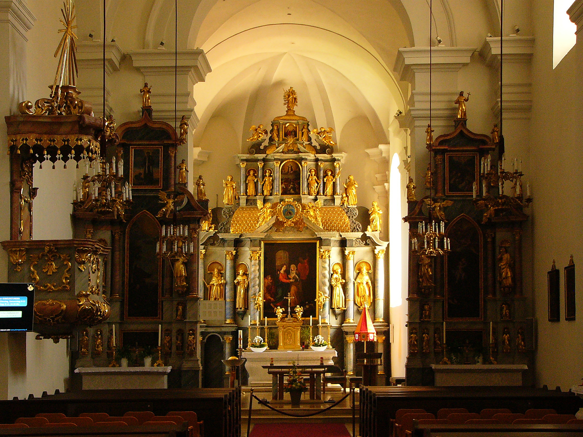 Das Schiff der Basilika in Güssing.